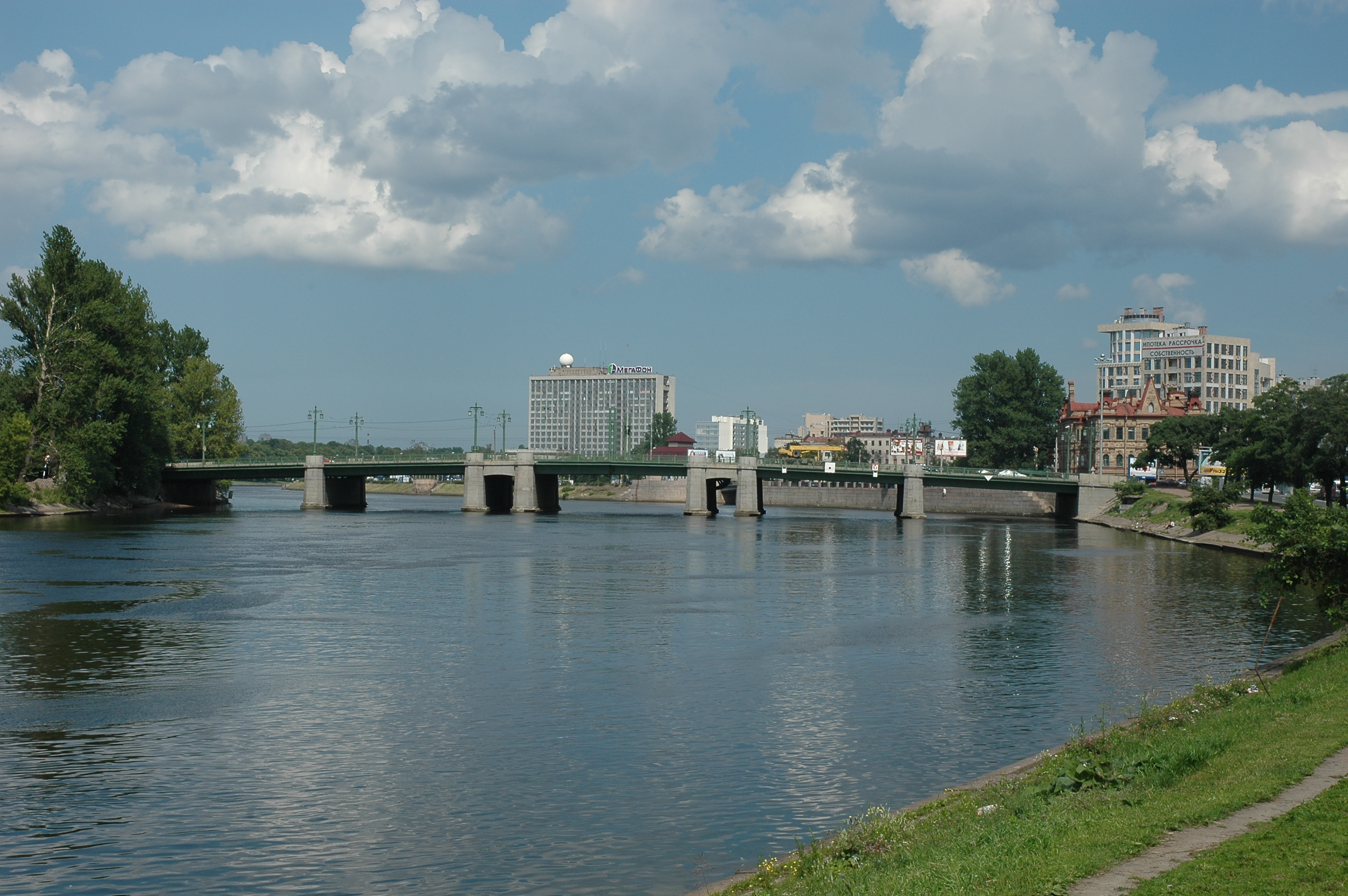 Bolshoi Krestovskii bridge across Malaia Nevka in St Petersburg